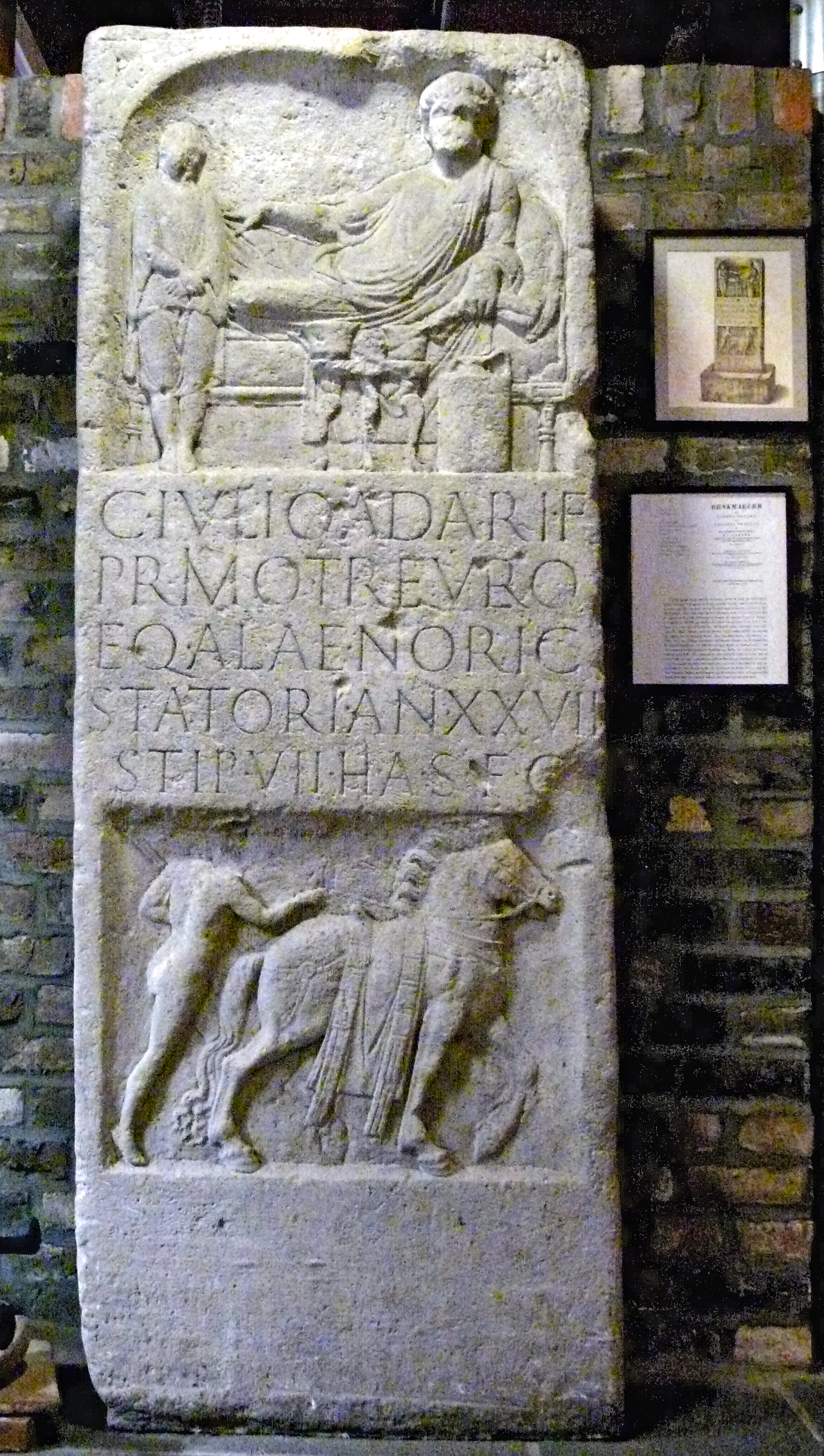 Römischer Grabstein CIL XIII, 08670 aus Burginatium; Städtisches Museum Kalkar, Kalkar